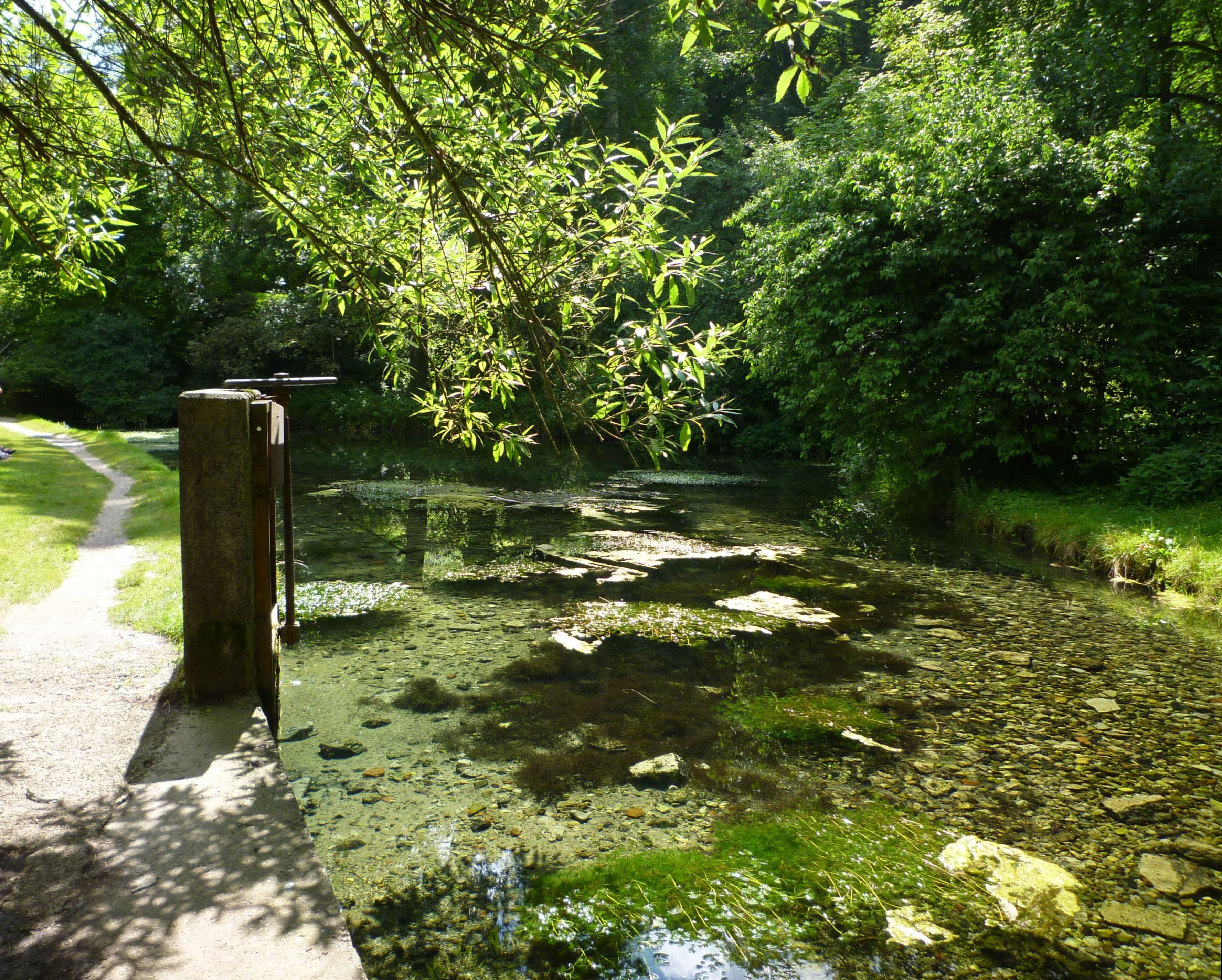 Karstquelle der Großen Lauter in Offenhausen.